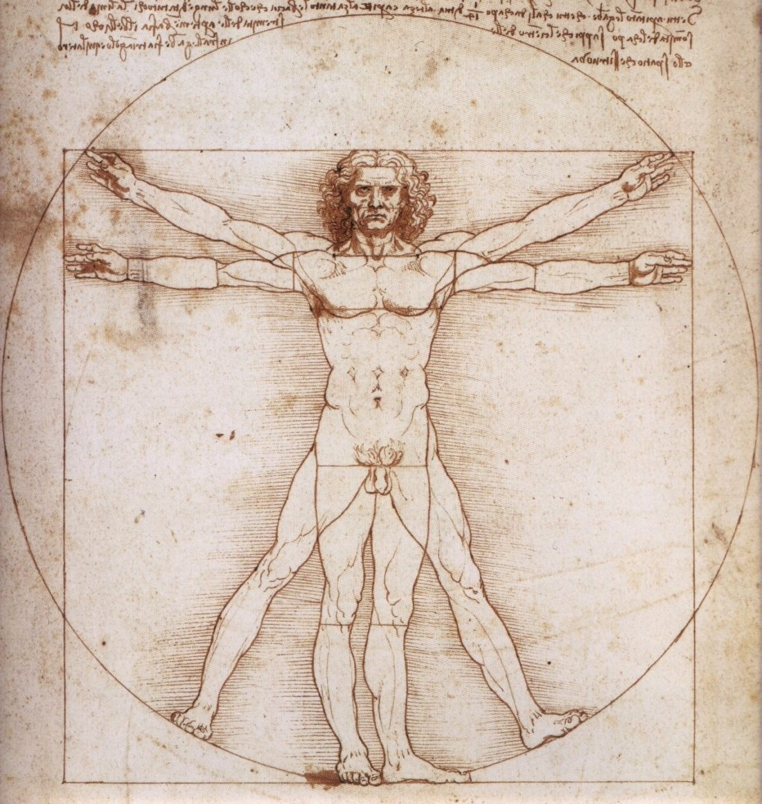 Vitruv